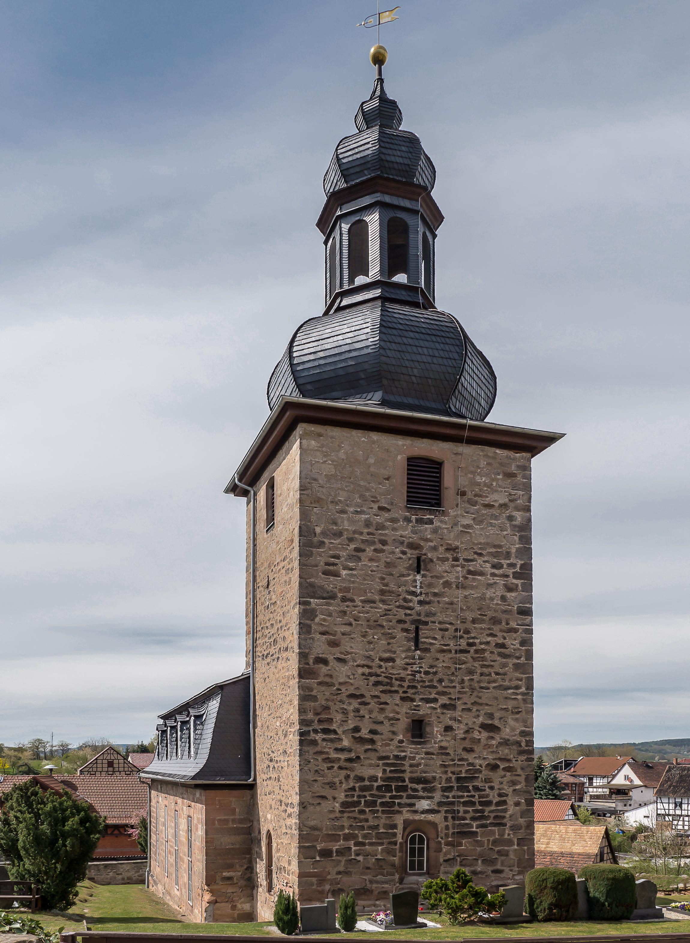 Denkmalgeschützte Kirche in Kolkwitz, Ortsteil von Uhlstädt-Kirchhasel, Südostansicht